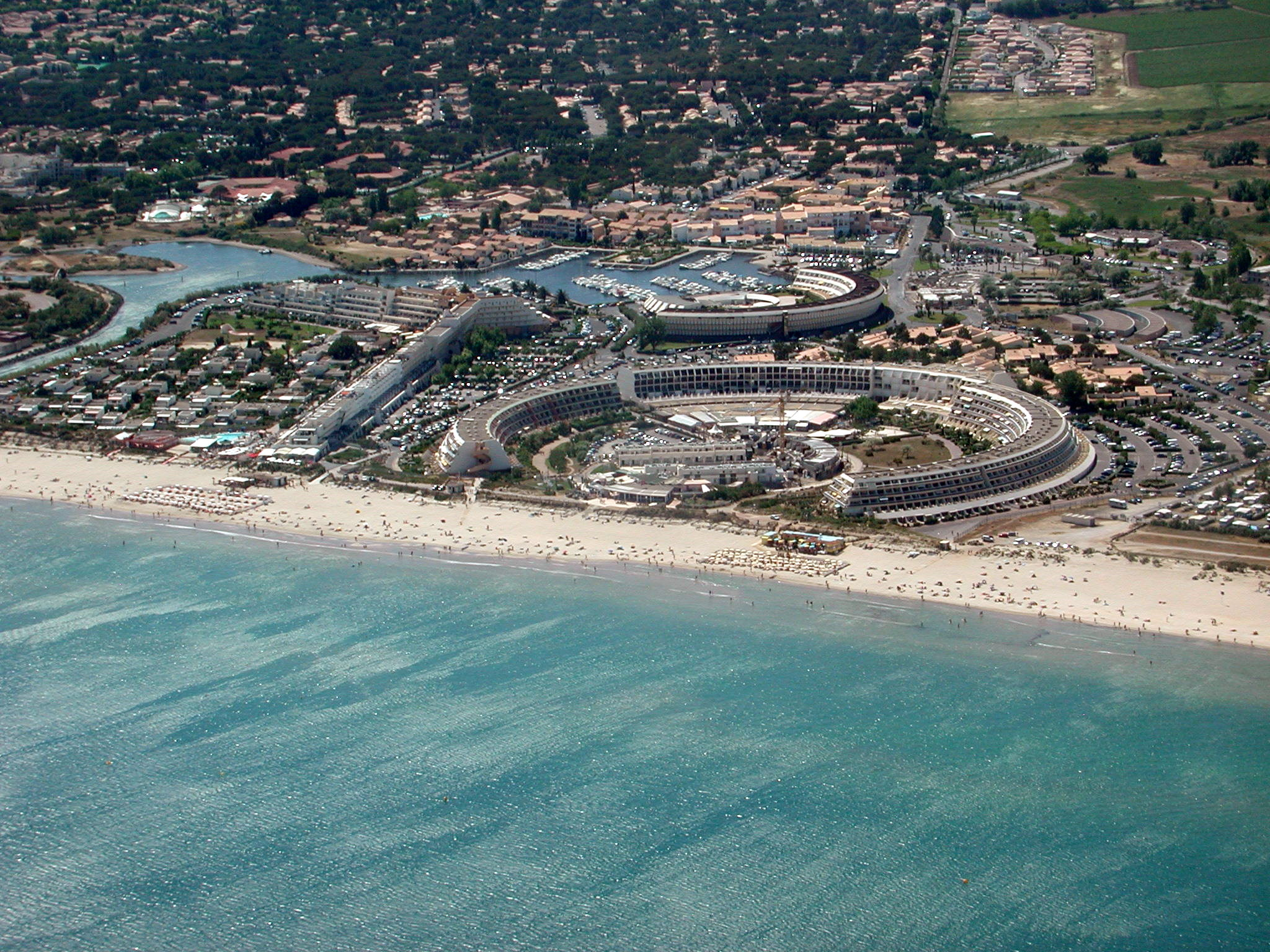 Cap d’Agde naturista negyede Franciaországban